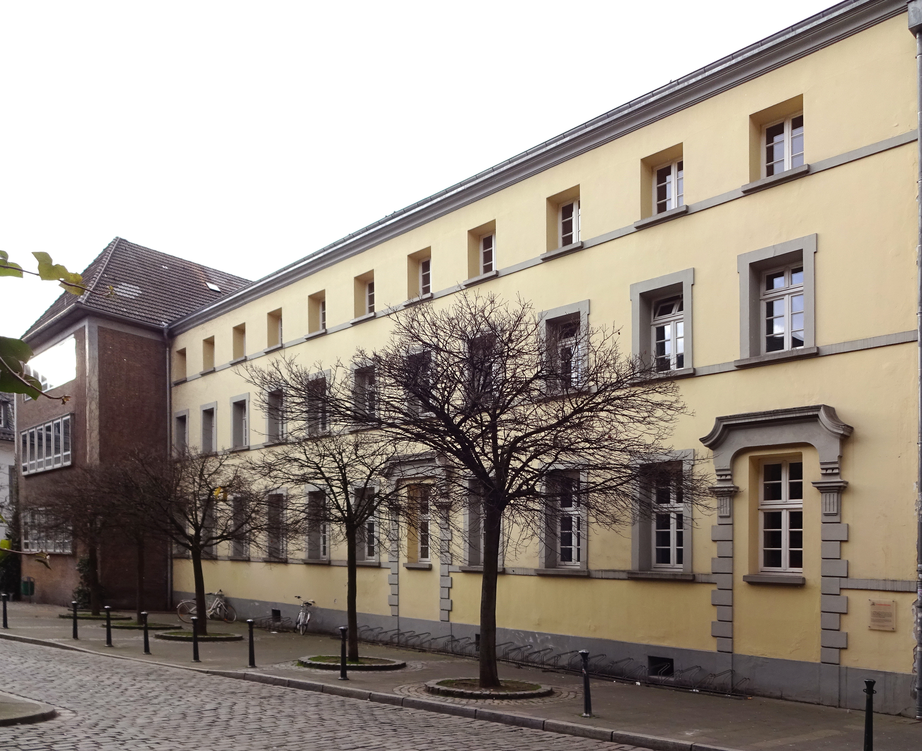 Ritterstraße 14, ehemaliges Ursulinenkonvent, Düsseldorf-Altstadt